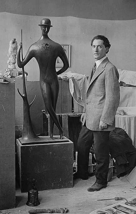 American sculptor Elie Nadelman (1882-1946)